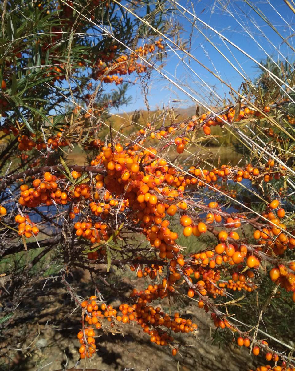 Ripe berries of sea-buckthorn. Selenginsky district, Buryatia, Russia